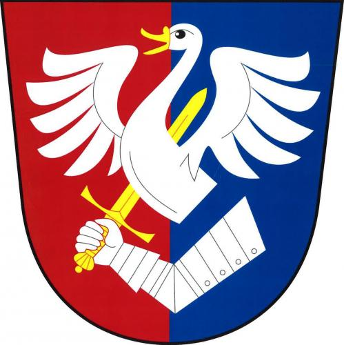 Chválenice znak